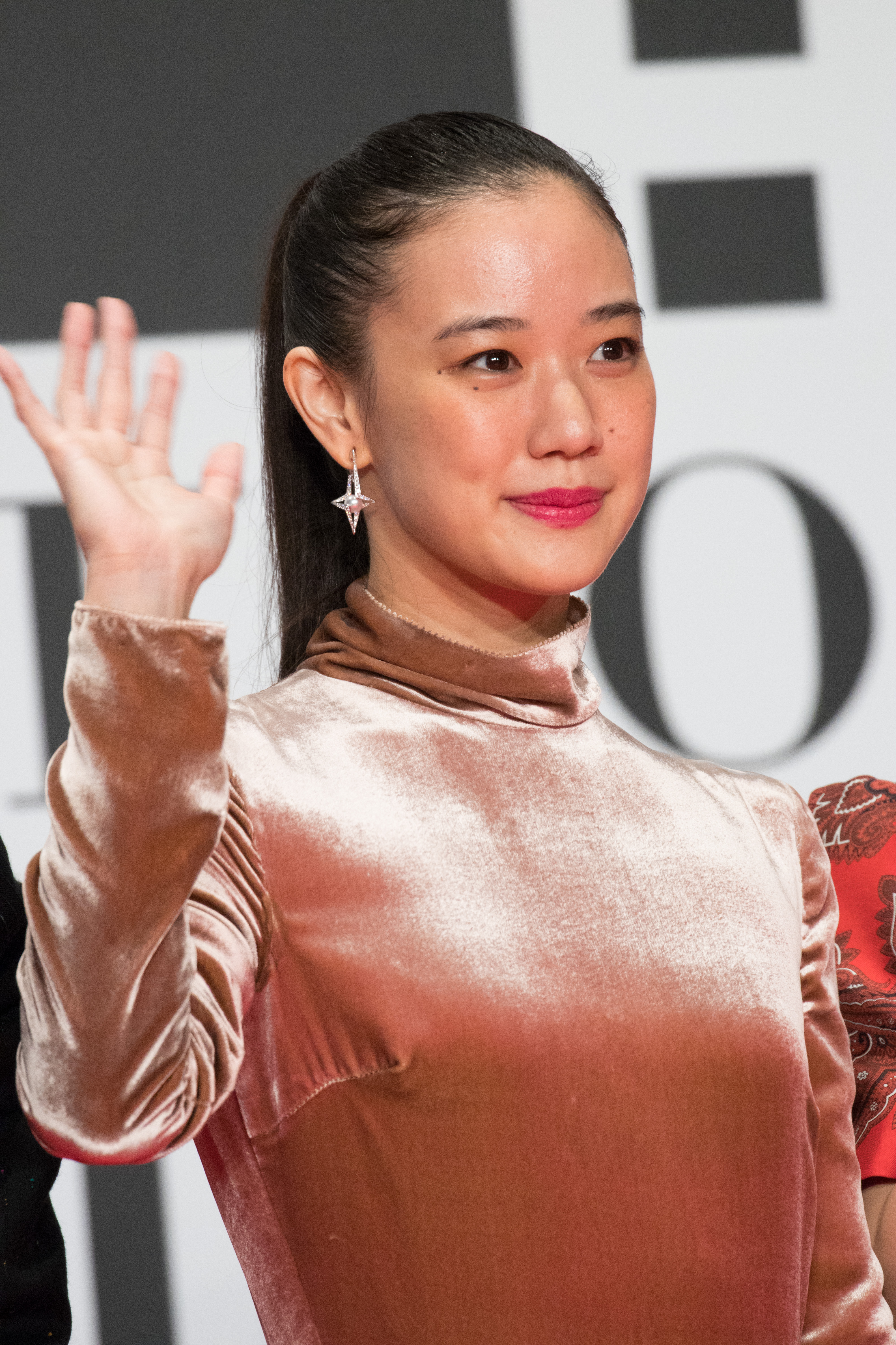 第29回 東京国際映画祭 オープニングセレモニー 蒼井優 (アズミ・ハルコは行方不明)